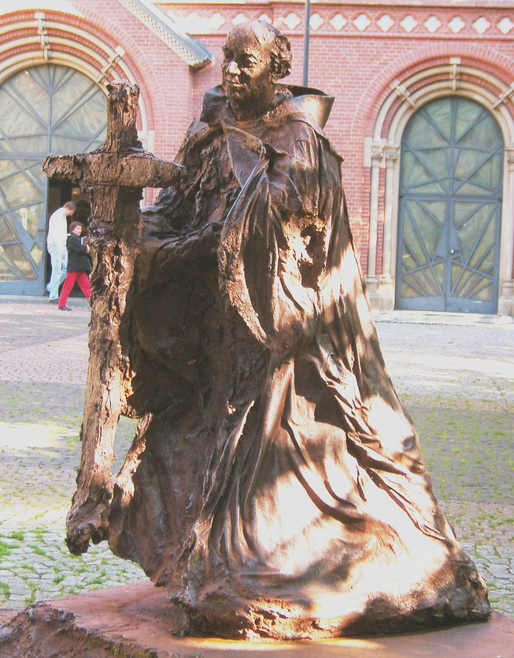 Statue des Heiligen Ansgar vor der Domkirche St. Marien in St. Georg.